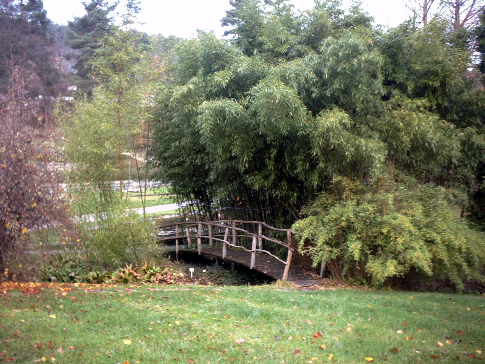 Tübingen - Neuer Botanischer Garten